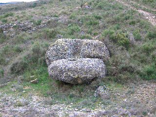 Piedra del sacrificio, Bulbuente (Zaragoza) España.